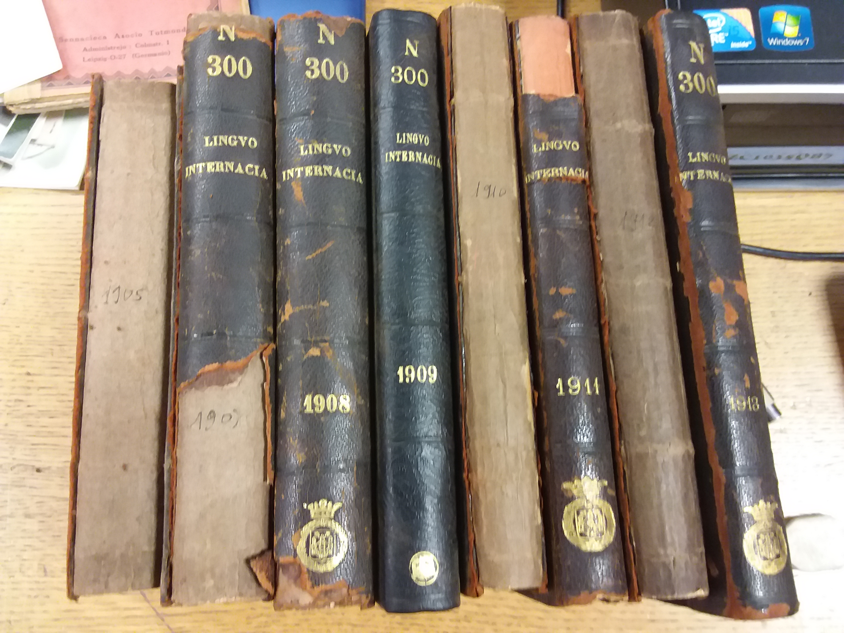 libroj "Lingvo Internacia", 1905-1913